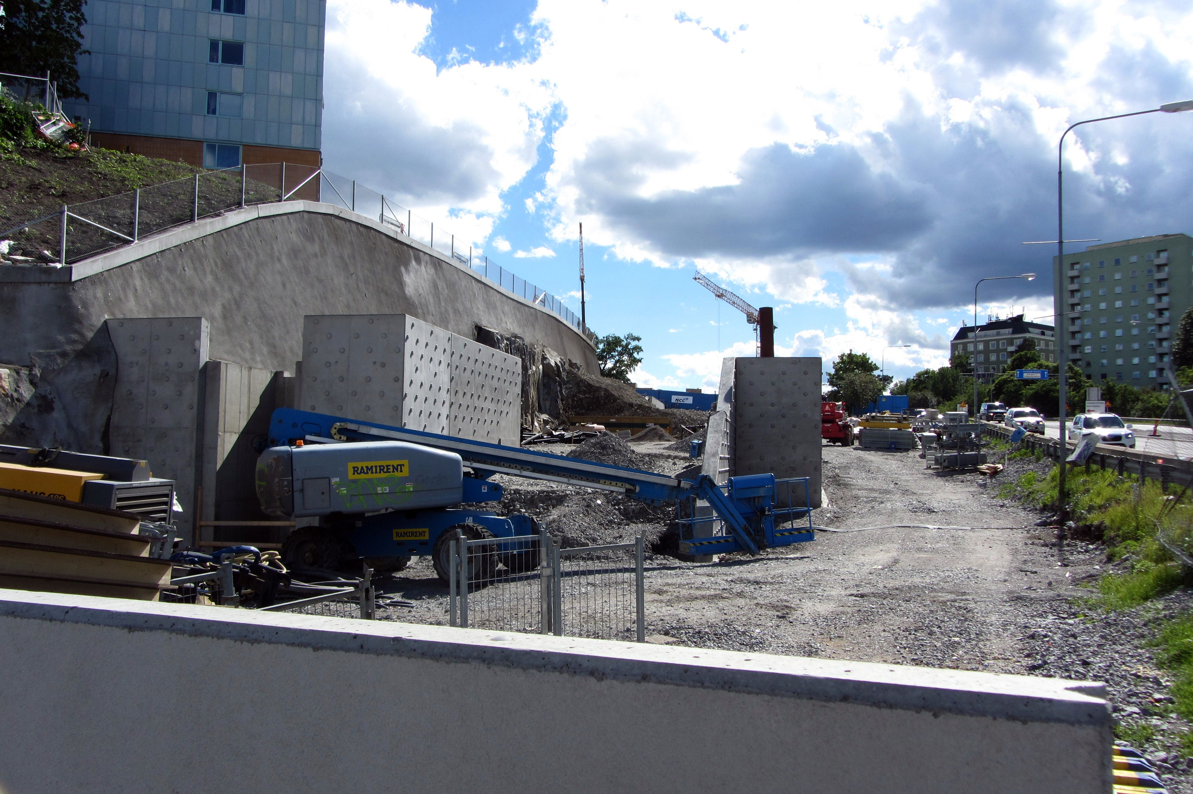 Streckenendpunkt in einer frühen Bauphase (Tief- und Betonbau), Richtung Solna centrum (–Alvik)